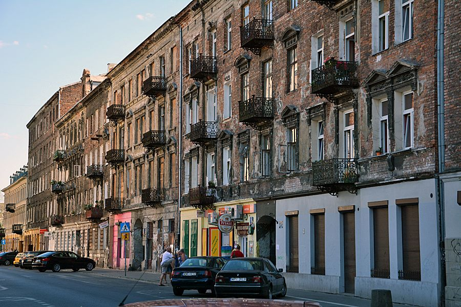 Strasse in Praga (Warschau)